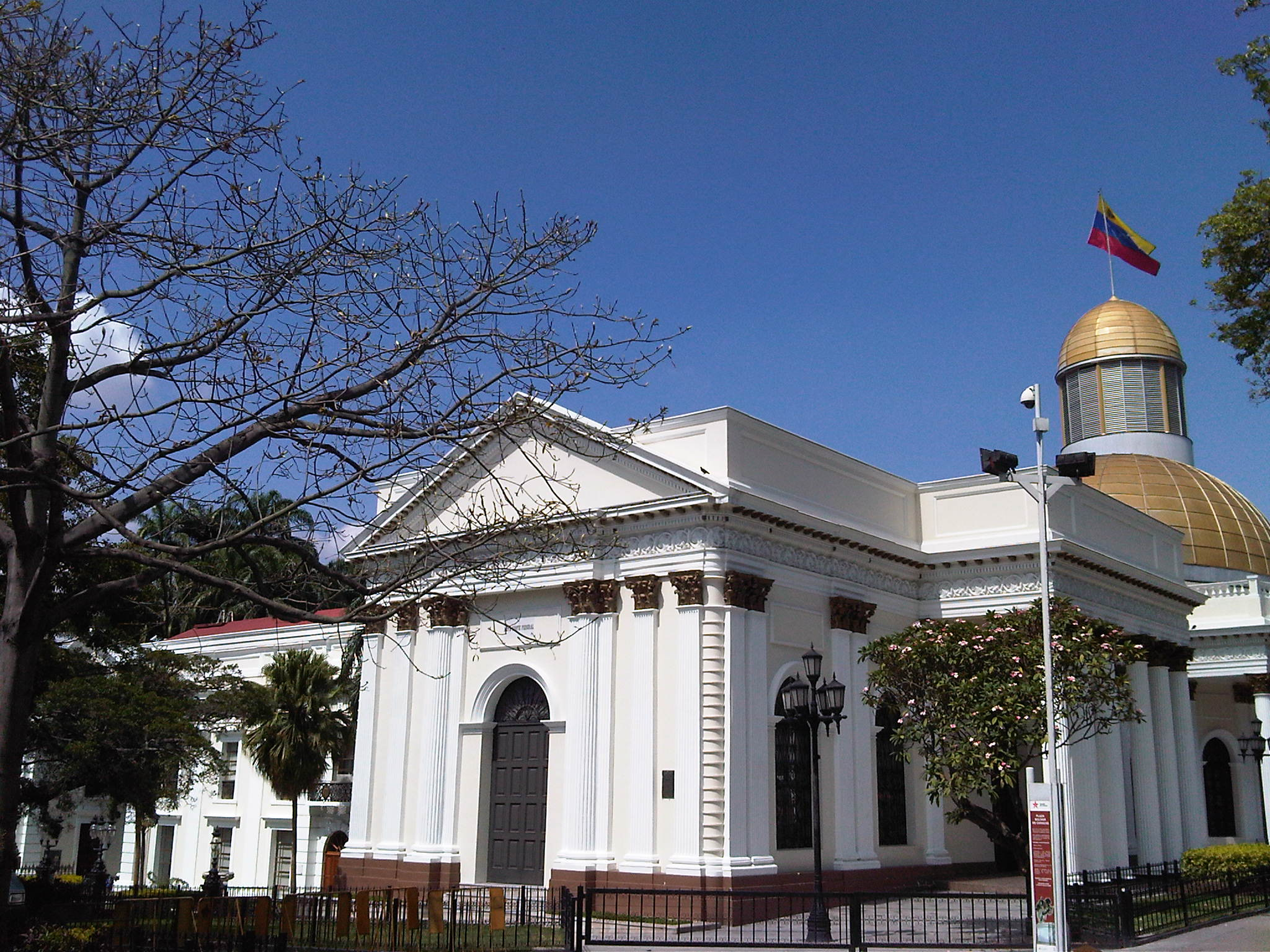 Palacio Federal Legislativo. Capitolio